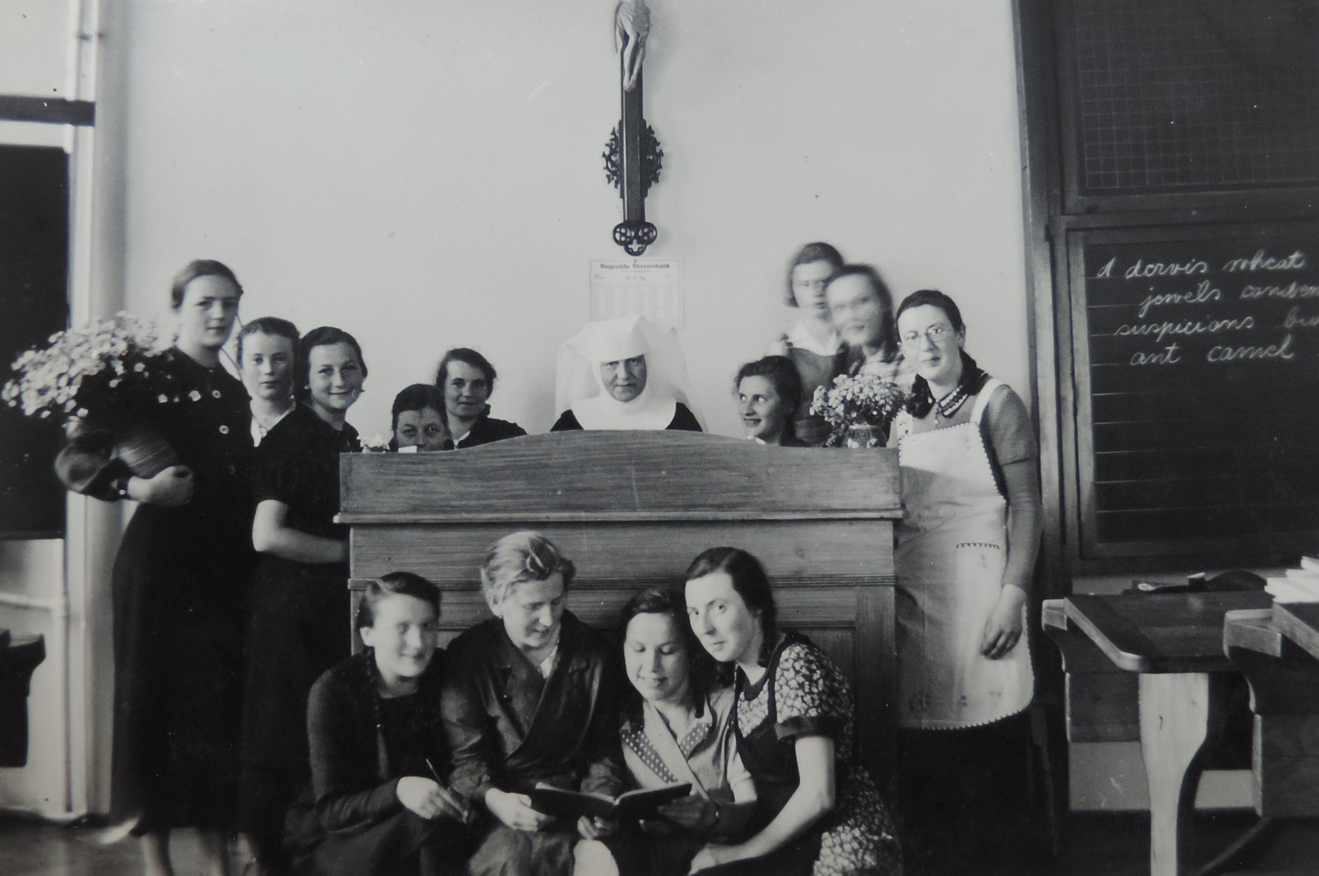 Kindergärtnerinnenseminar Nördlingen